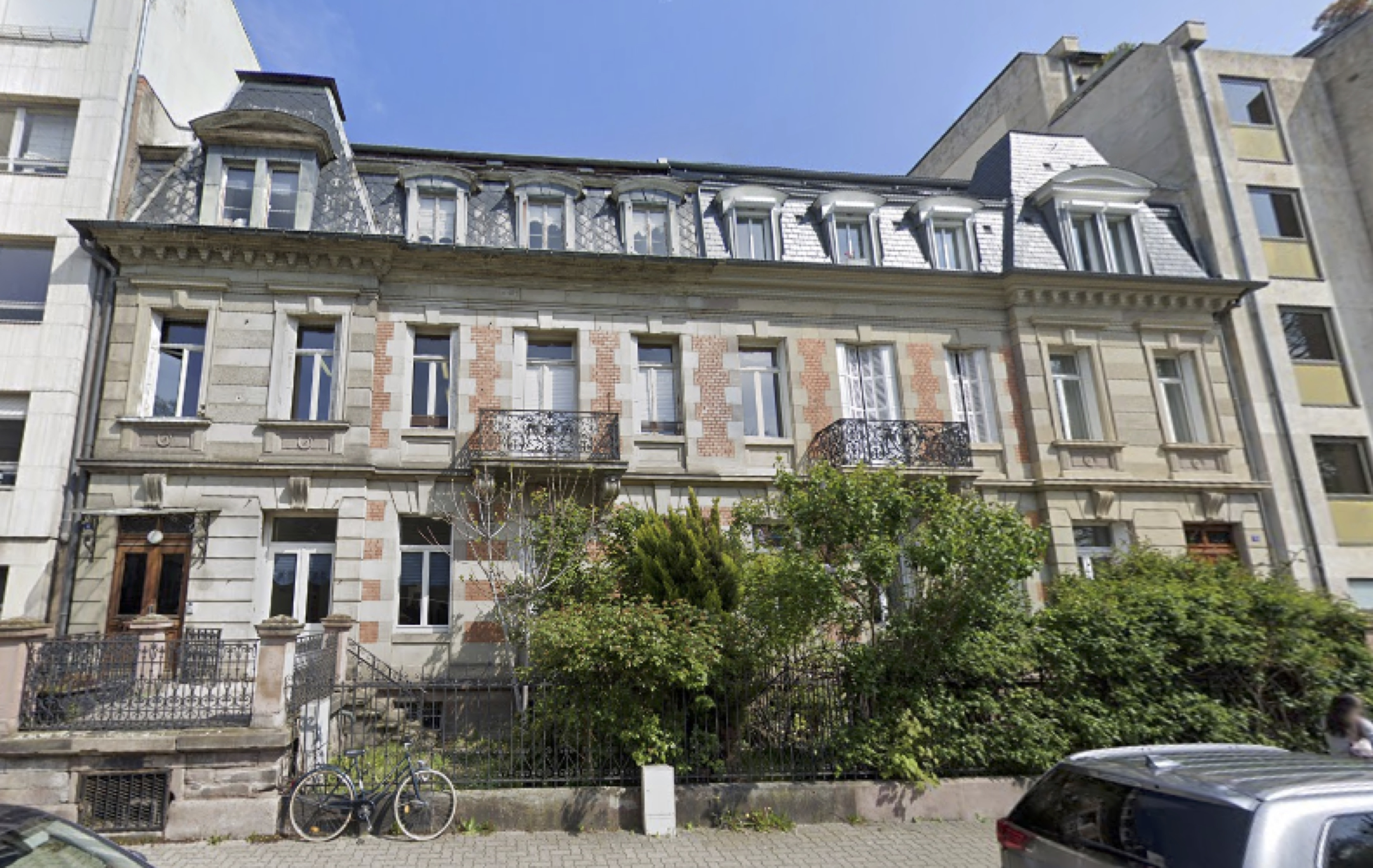 Domicile de Cavaillès avant de s'installer rue Gounod